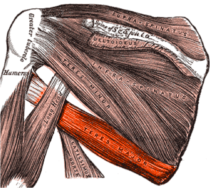 Teres major, colorized